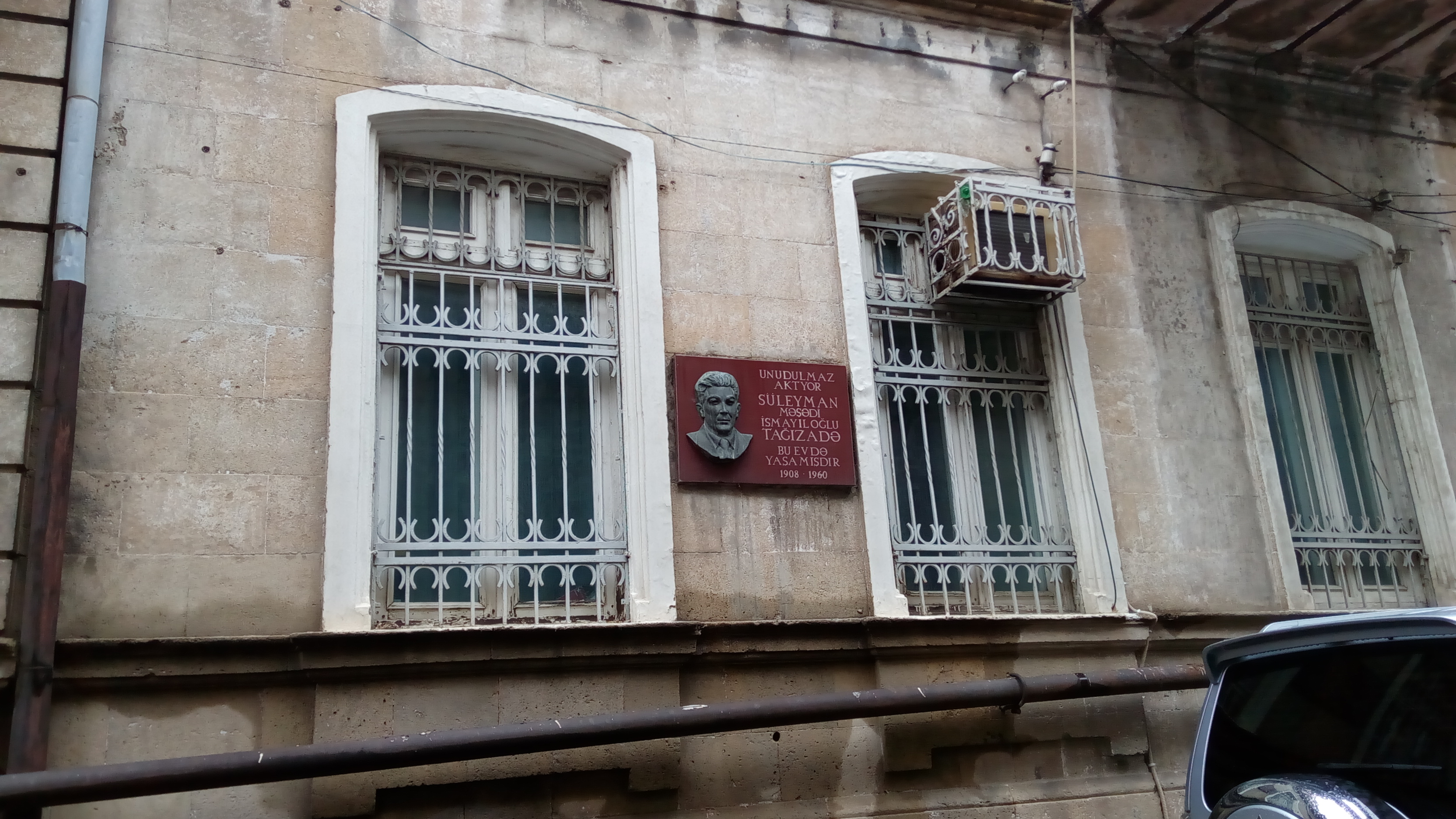 Süleyman Tağızadənin yaşadığı ev